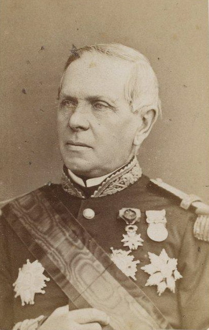 Le contre amiral Louis Raymond de Montaignac de Chauvance (1811-1891)